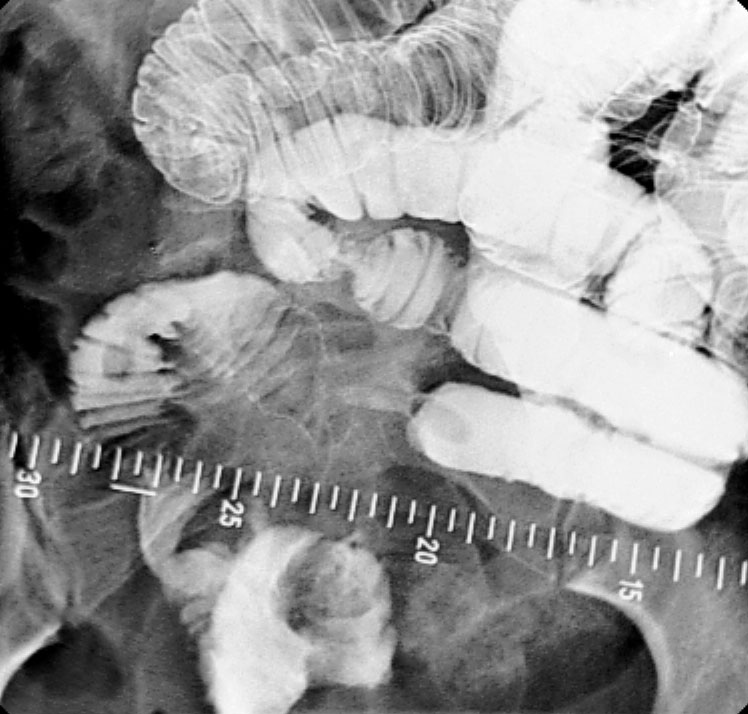 Fixierte Stenose des Dünndarms bei Morbus Crohn. Enteroklysma im Doppelkontrast.